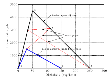 Een autosnelweg met 2 rijstroken heeft een wegcapaciteit van ongeveer 4500 vtg/uur (punt 5 in het figuur). Stel de verkeersintensiteit op een bepaald moment is 3000 vtg/h, punt 1. Op een gegeven moment (door een ongeval) wordt de rijbaan geheel geblokkeerd. Dit betekent dat van toestand 1, de ongestoorde verkeersstroom, de situatie over gaat naar toestand 6. Door een lijn te trekken tussen deze twee punten kan de schokgolf worden bepaald (snelheid kan worden bepaald uit de hoek van de lijn tussen 1 en 6). Na afloop van de blokkering zou bij een vrije weg de toestand van stremming overgaan naar toestand 5, de capaciteit van de weg. Stel echter dat door een rijdende platoon van vrachtauto’s (op de rechterstrook) de capaciteit van de weg niet gehaald wordt, maar wel toestand 3. De schokgolf met snelheid lijn 6-3 loopt stroomopwaarts. Op de linkerstrook, langs het platoon vrachtauto’s (de rijdende bottle-neck), bestaat toestand 2 en benedenstrooms daarvan toestand 4. Als de rijdende bottle-neck verdwijnt gaat toestand 3 over in toestand 5, met als overgang een schokgolf met snelheid lijn 3-5. Na afloop van de stremming kan de verkeersstroom van toestand 1 naar 3 gaan, snelheid lijn 1-3. Wanneer de hinder van de platoon vrachtwagens voorbij is kan vantoestand 1 naar toestand 5 worden gegaan met snelheid lijn 1-5.